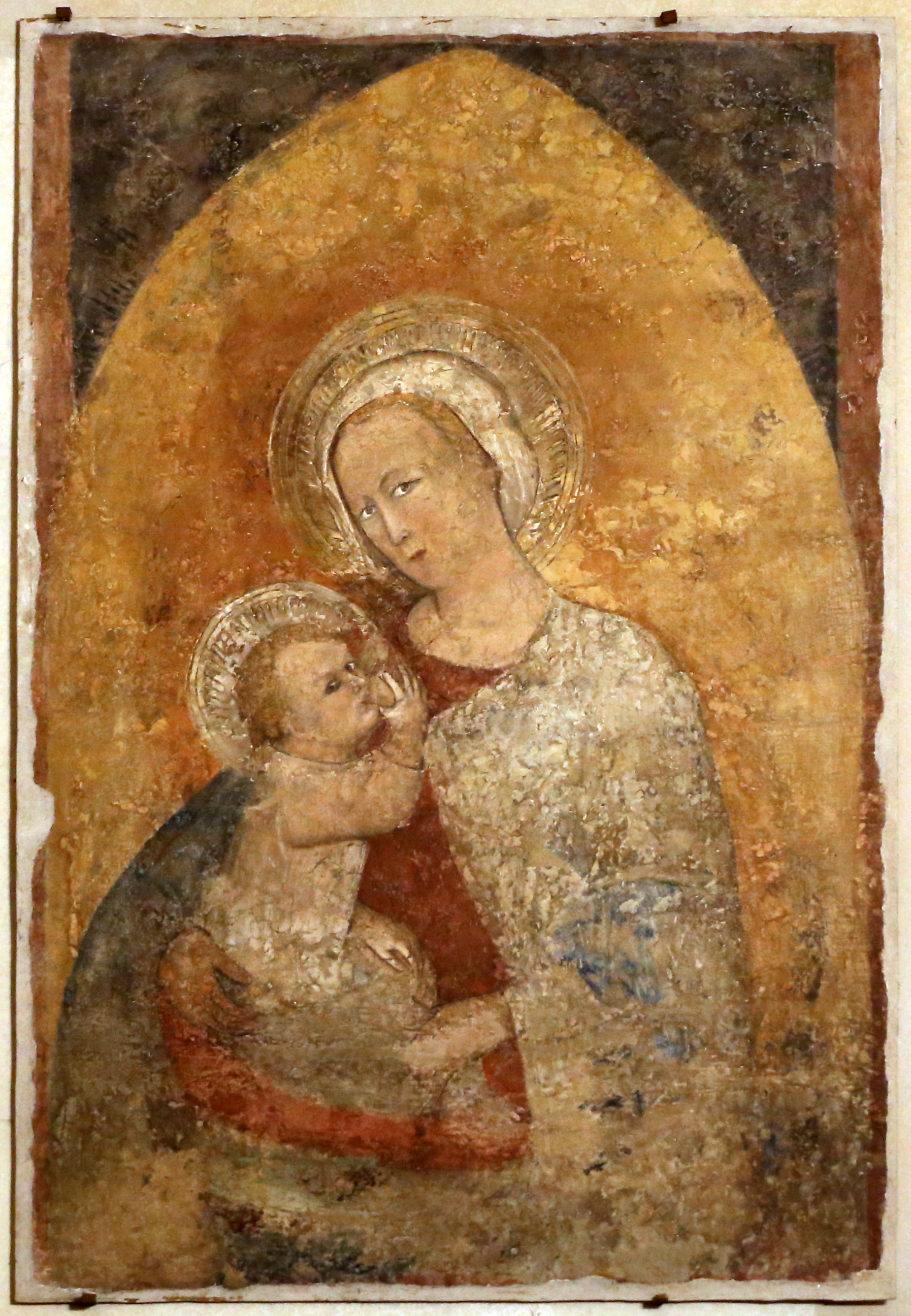 palazzo dei Servi di Maria This is a photo of a monument which is part of cultural heritage of Italy.